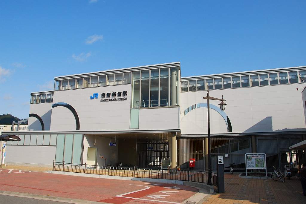 播磨新宮駅の新駅舎